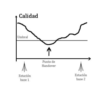 Esquema de punto de handover